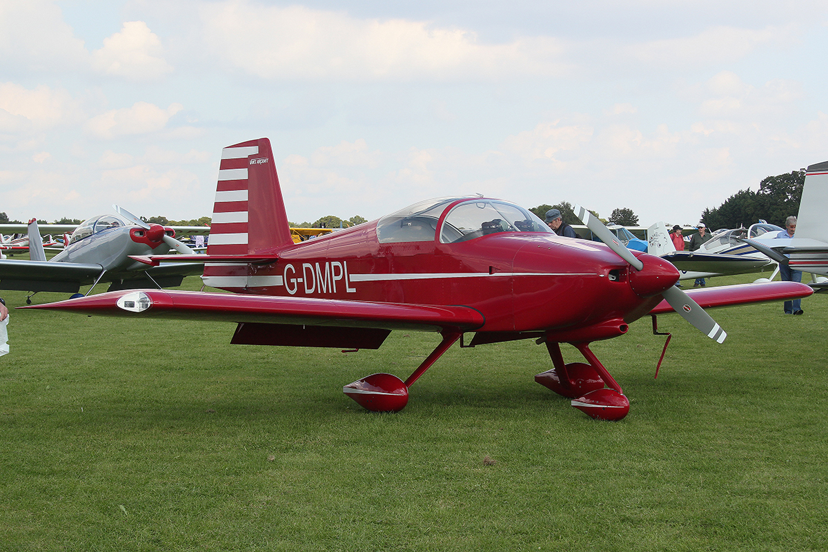 G-DMPL Vans RV-7A @ Sywell 02/09/2017